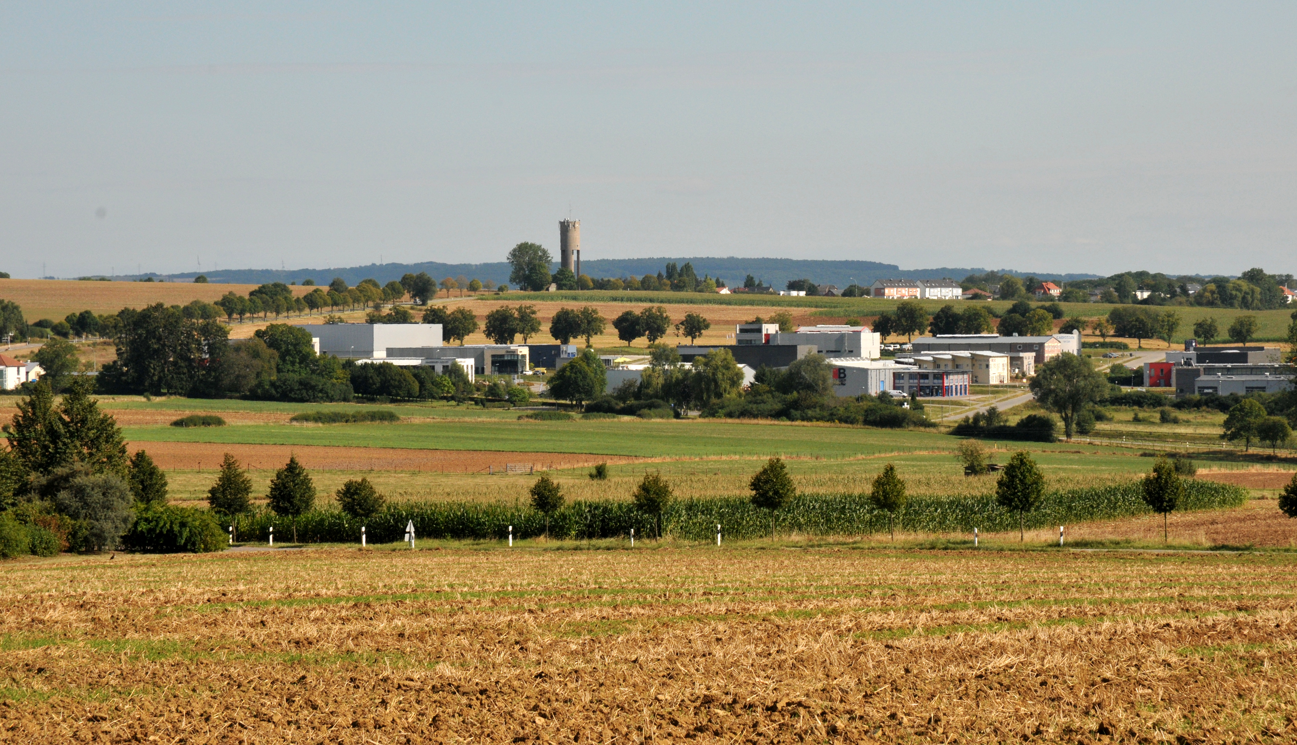 Vue op Elleng-Gare.